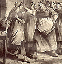 Ernest Capendu : illustratiion de son roman Le tambour de la 32e demi-brigade